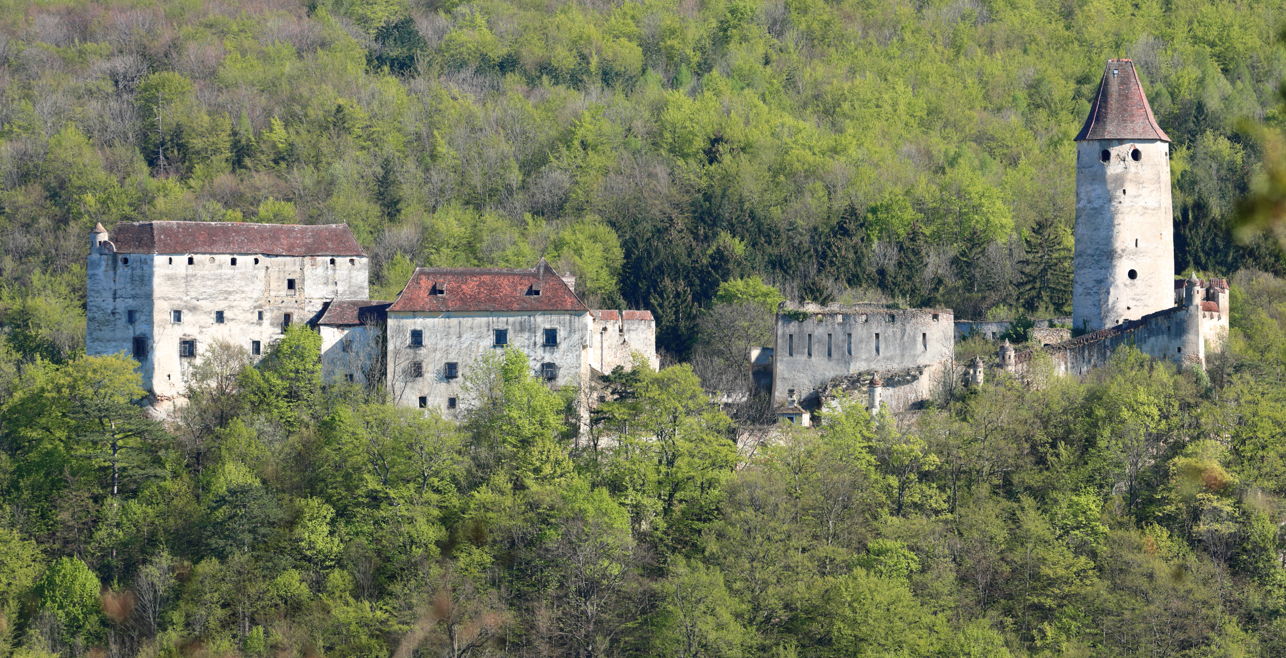 Nordwestansicht der Burg in der niederösterreichischen Gemeinde Seebenstein. Die mittelalterliche Burg wurde auf einem Felsrücken errichtet und vor allem im 17. Jahrhundert umgebaut und erweitert.